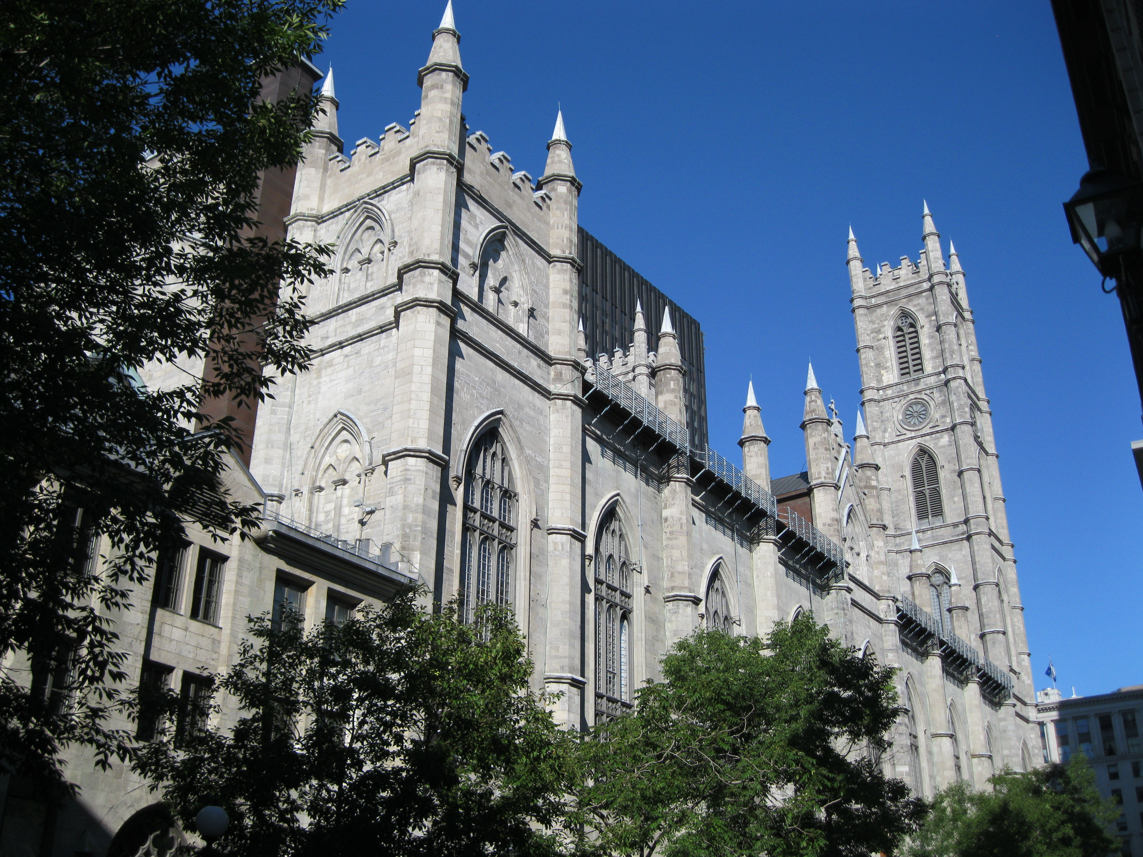 Basilique Notre-Dame de Montréal, du côté de la rue Saint-Sulpice